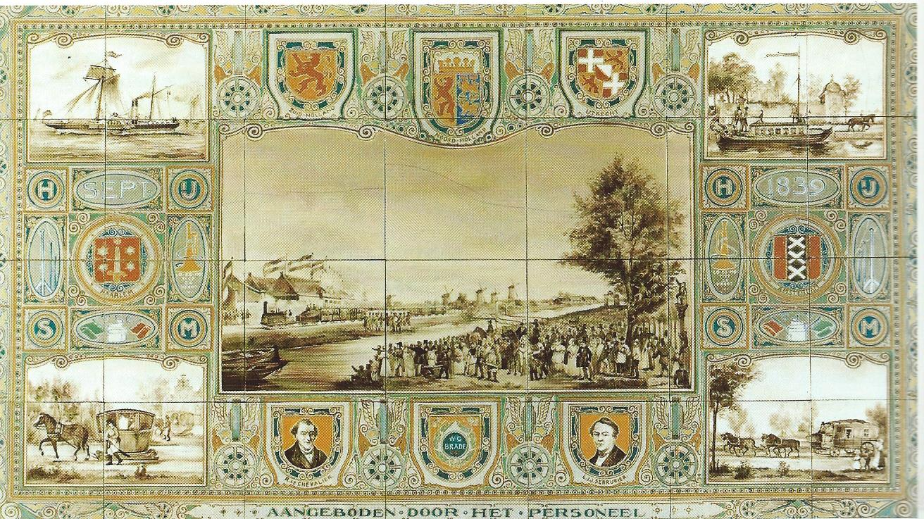 Tegeltableau aangeboden door het personeel ter gelegenheid van het 75-jarig bestaan van de Hollandsche IJzeren Spoorweg Maatschappij. Daarop staat onder anderen: sept 1914.